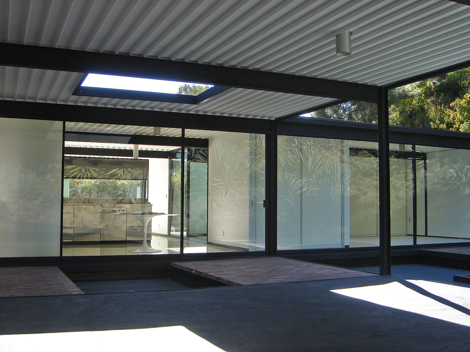 Entrance.